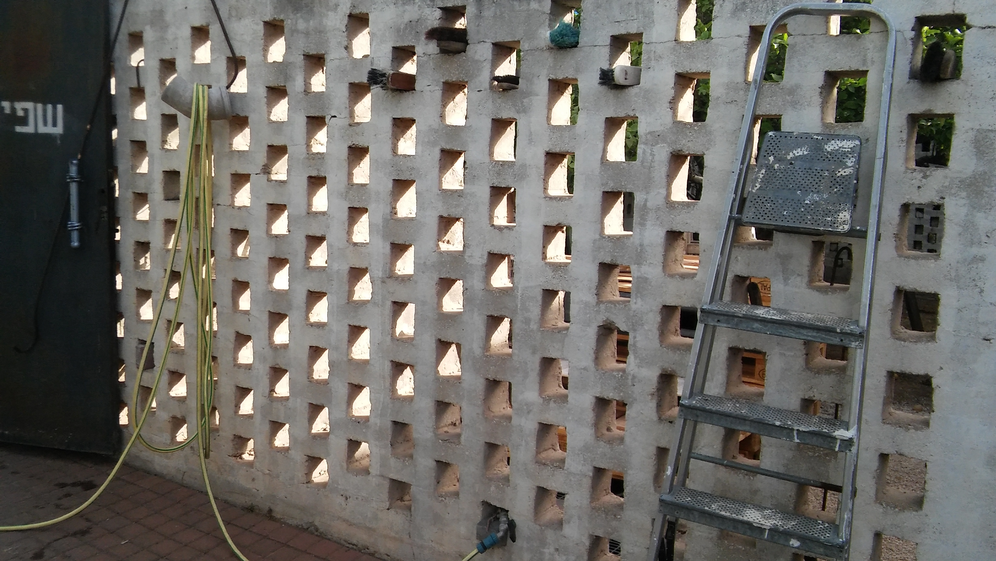 תחנת הרכבת הישנה של פתח תקווה - קיר לבנים אופייני לבנייה הבריטית (ניתן למצוא בתחנות דיר סניד וכפר ג'יניס)